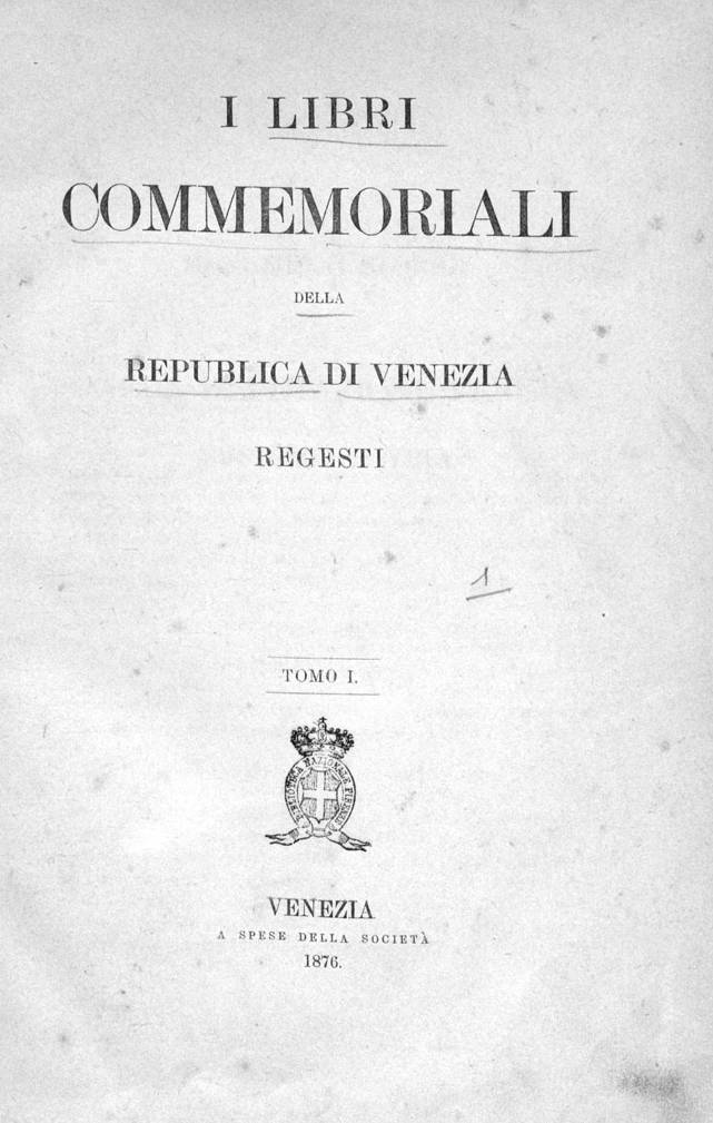 Frontespizio